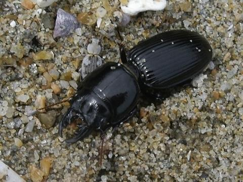 Scarites aterrimus （ヒョウタンゴミムシ）at Saikai, Nagasaki（長崎県西海市）